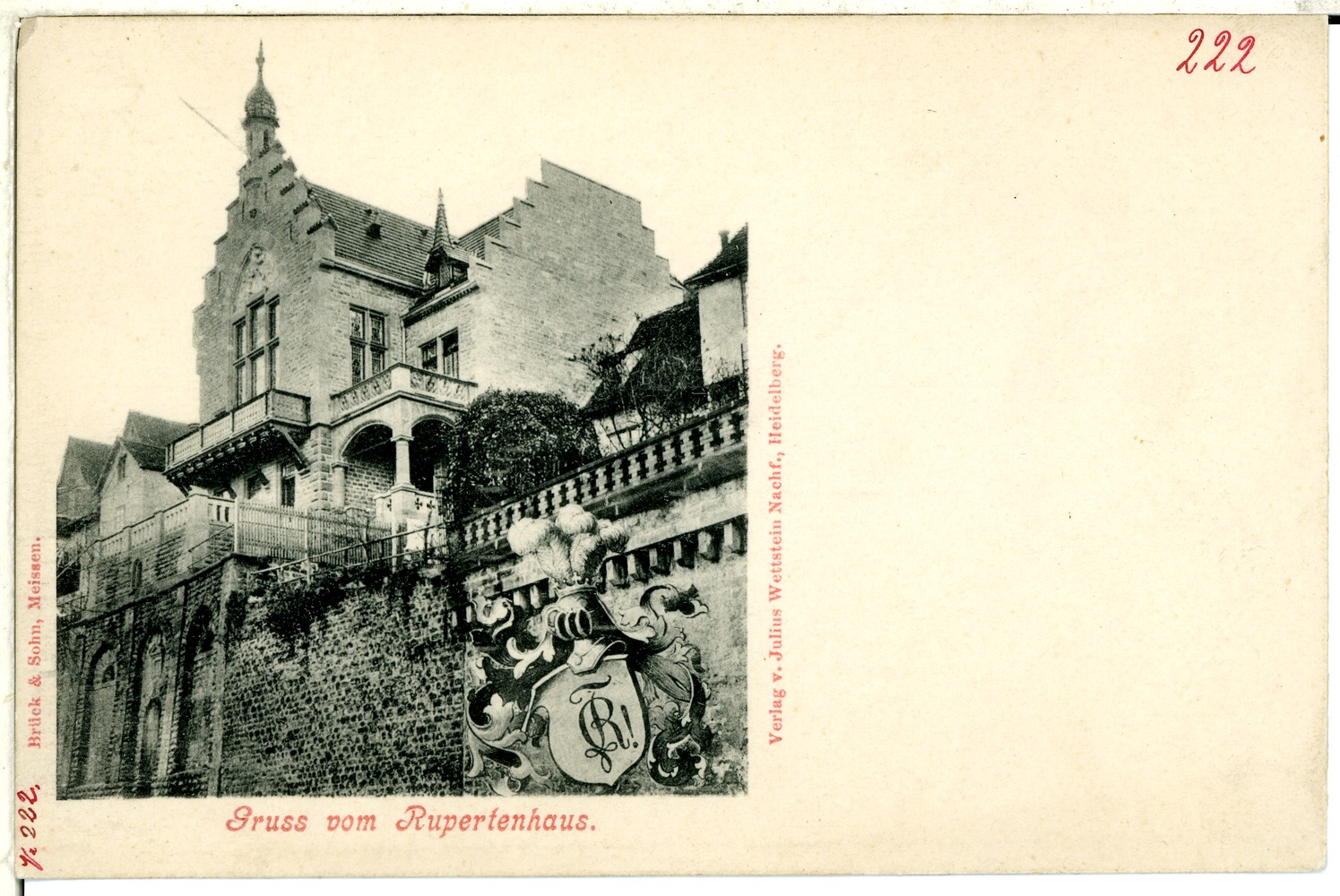 Heidelberg; Rupertushaus This postcard is from publisher Brück & Sohn in Meißen ( postcard has a unique number 00222 and is available in a higher resolution at the publisher. This images was uploaded in a cooperation project between Wikipedians and the publisher.